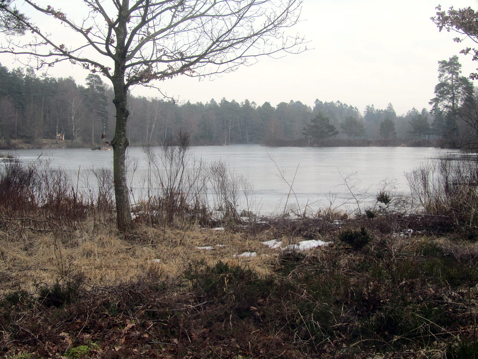 Vejlbo mose ved Silkeborg